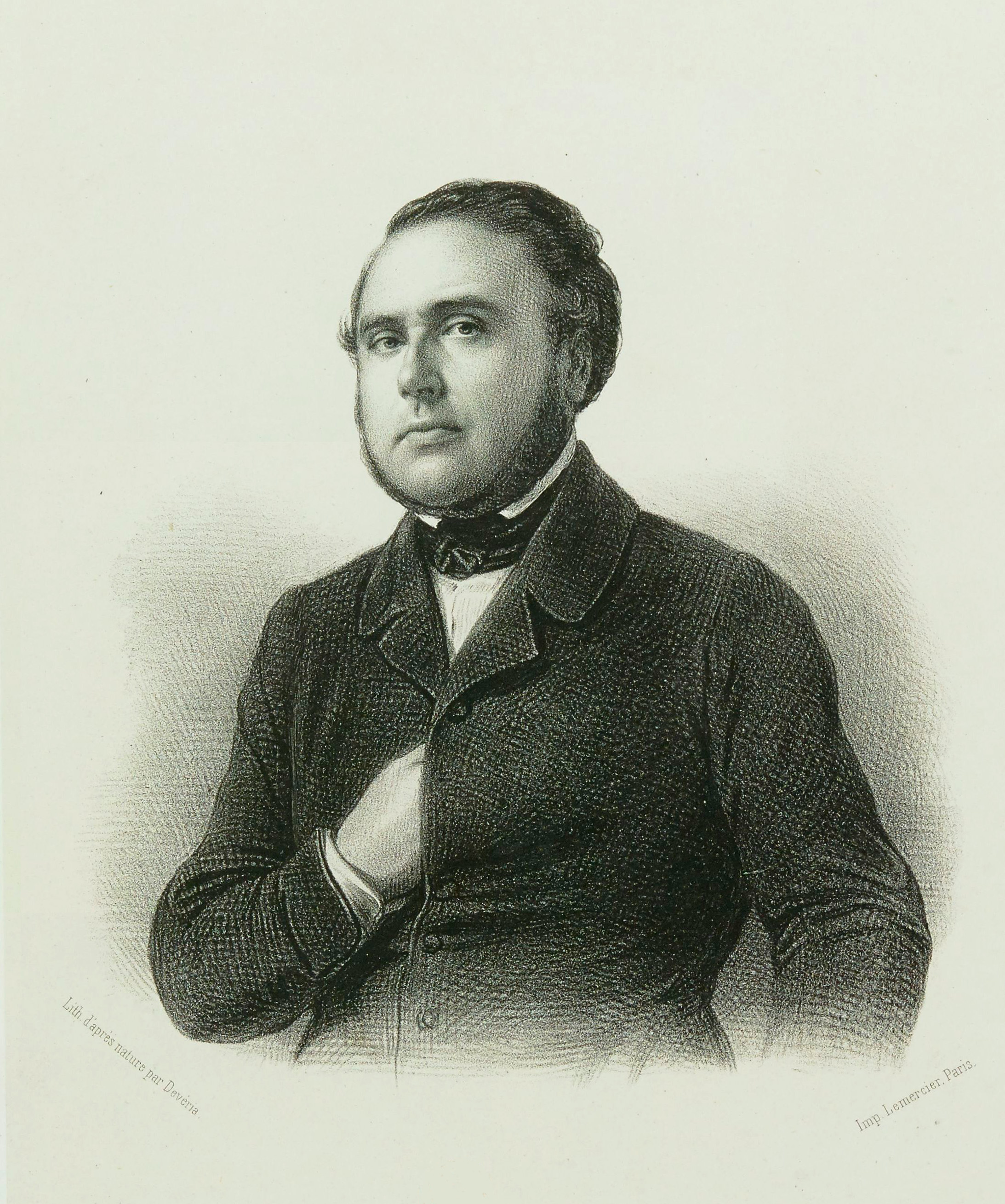 Assemblée nationale, galerie des représentants du peuple - Alexandre Ledru-Rollin